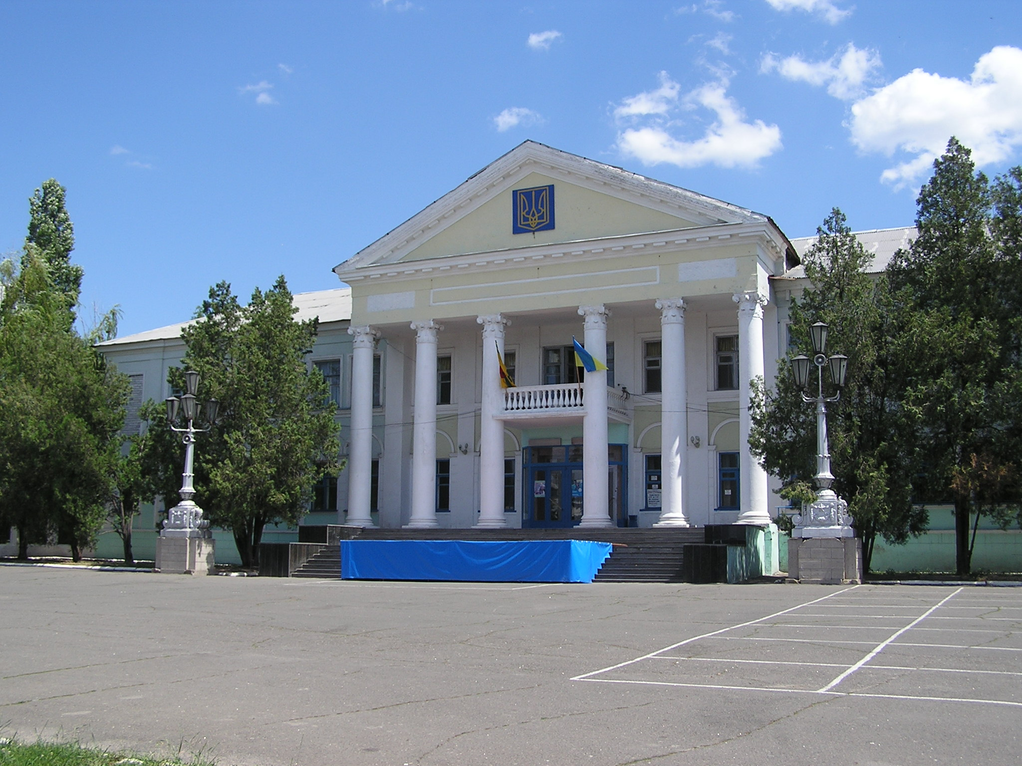 Докучаевск